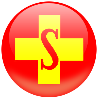 Logo Záchranné služby ASČR